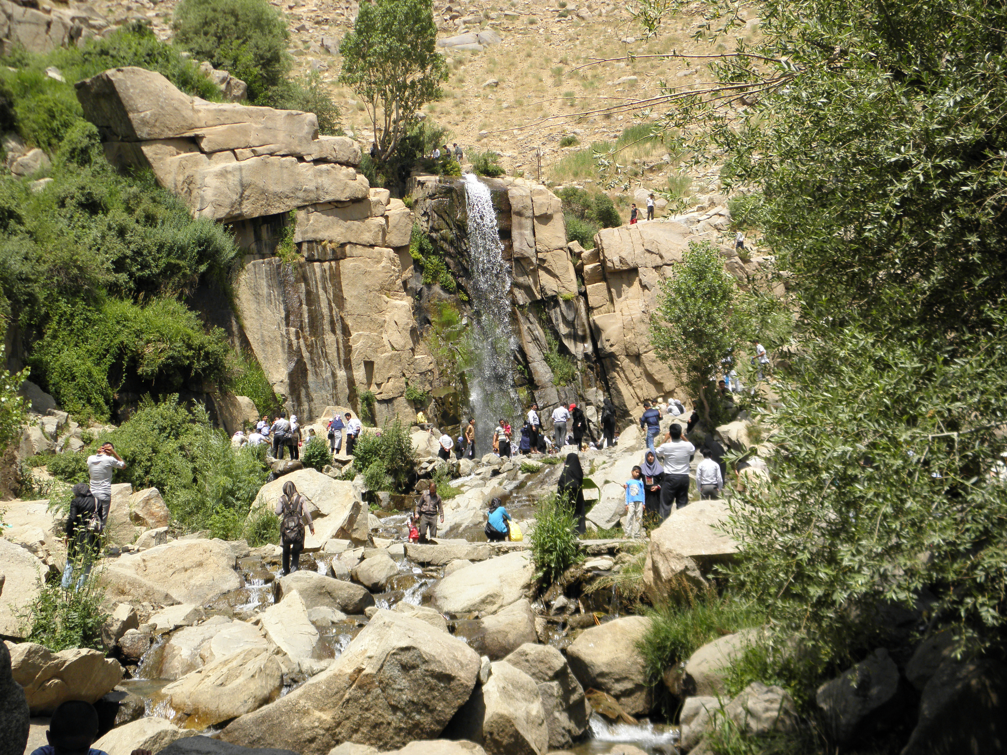 آبشار گنج‌نامه